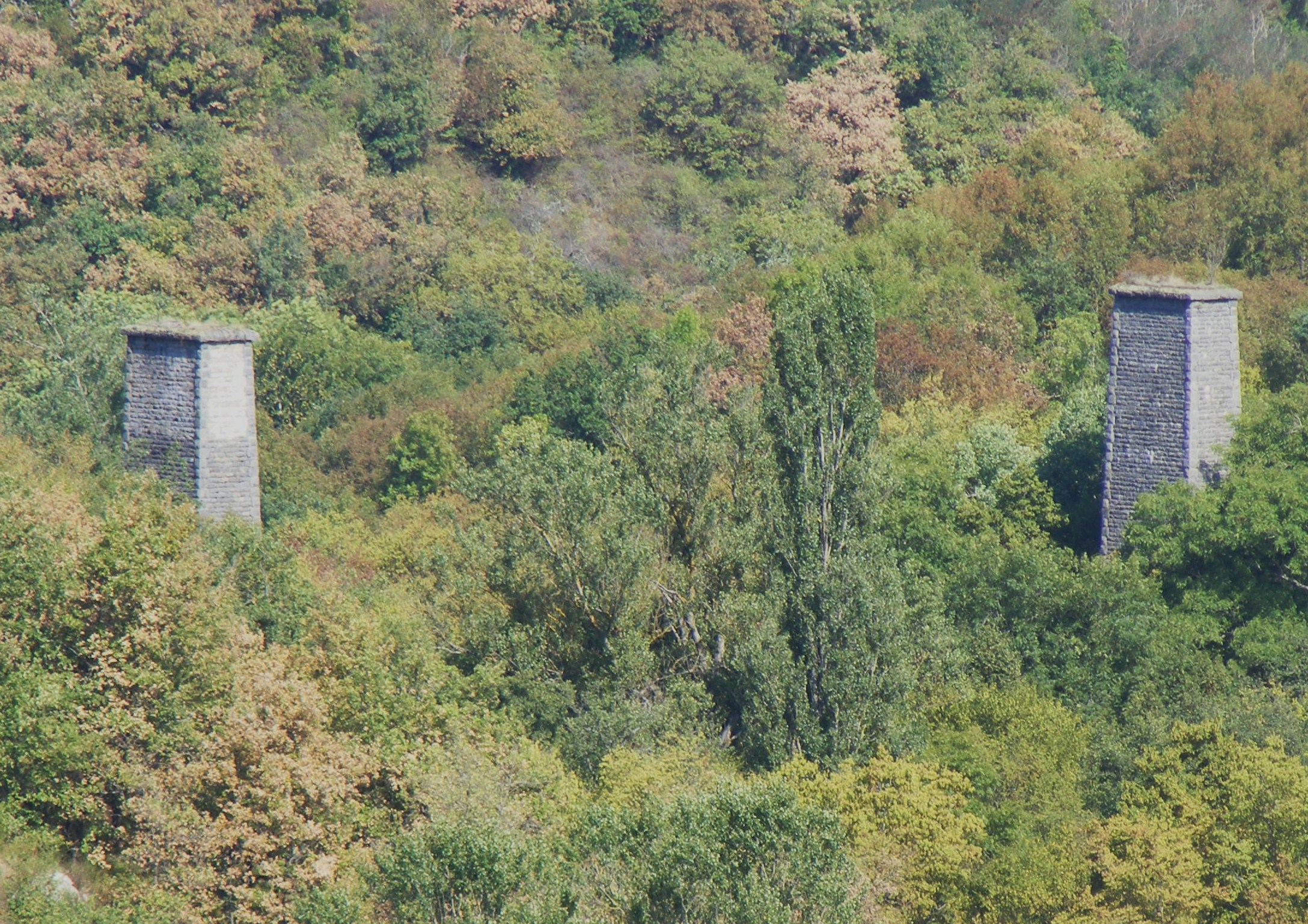 Viaduc inachevé - Ligne de Mornant (Rhone) à Rive-de-Gier (Loire) - Début du XX° siècle